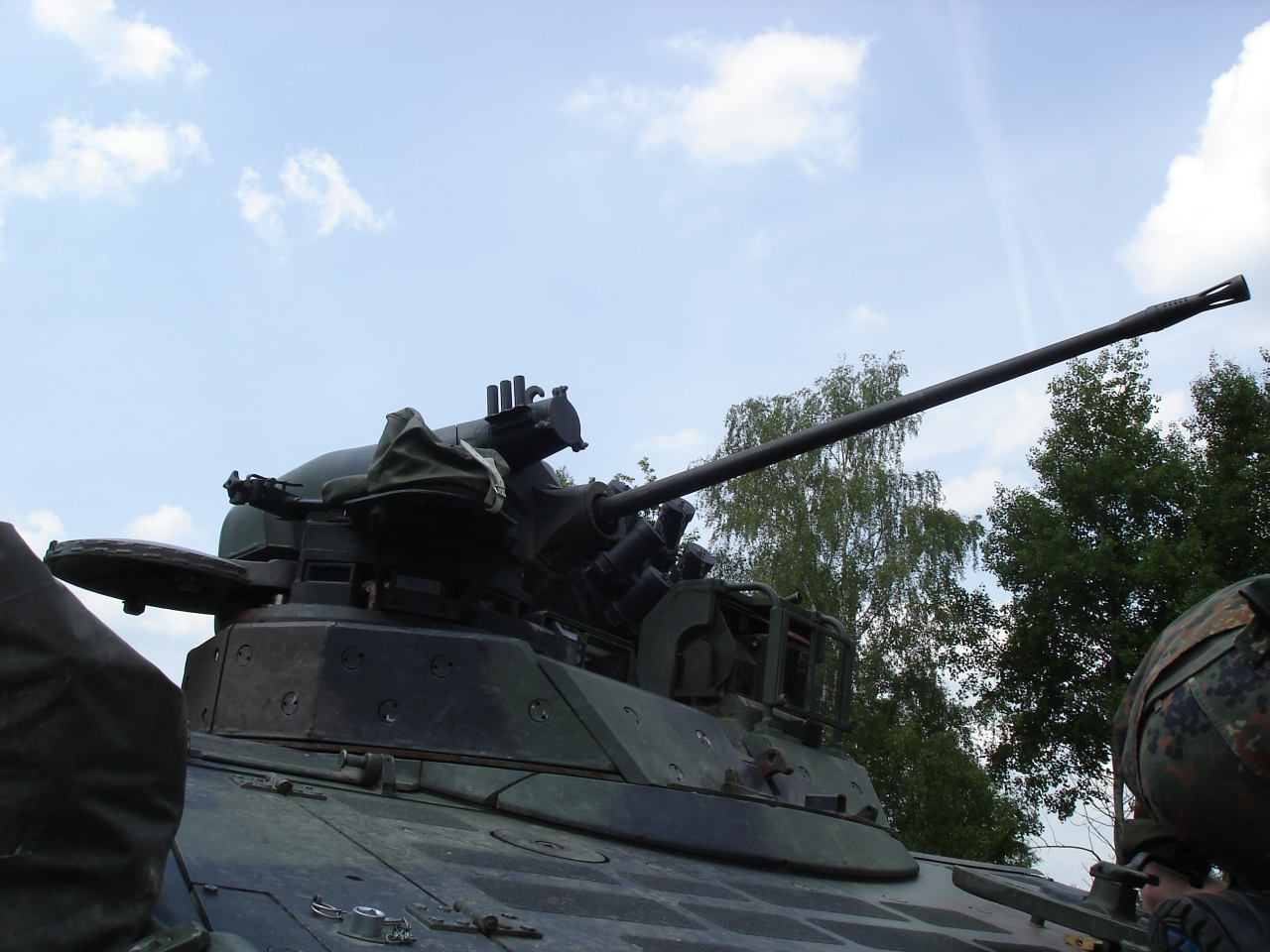 Turm Marder 1A3 von rechts, Abgedeckt die MILAN Halterung. Gut zu erkennen das gepanzerte Wärmebildgerät mit Schutzgitter. Oberhalb der Bordmaschinnenkanone die alte Position des Turmmaschinengewehr.